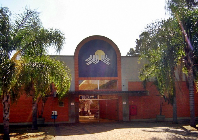 Campus da Universidade Metodista de Piracicaba no município de Santa Bárbara d'Oeste, São Paulo, Brasil.